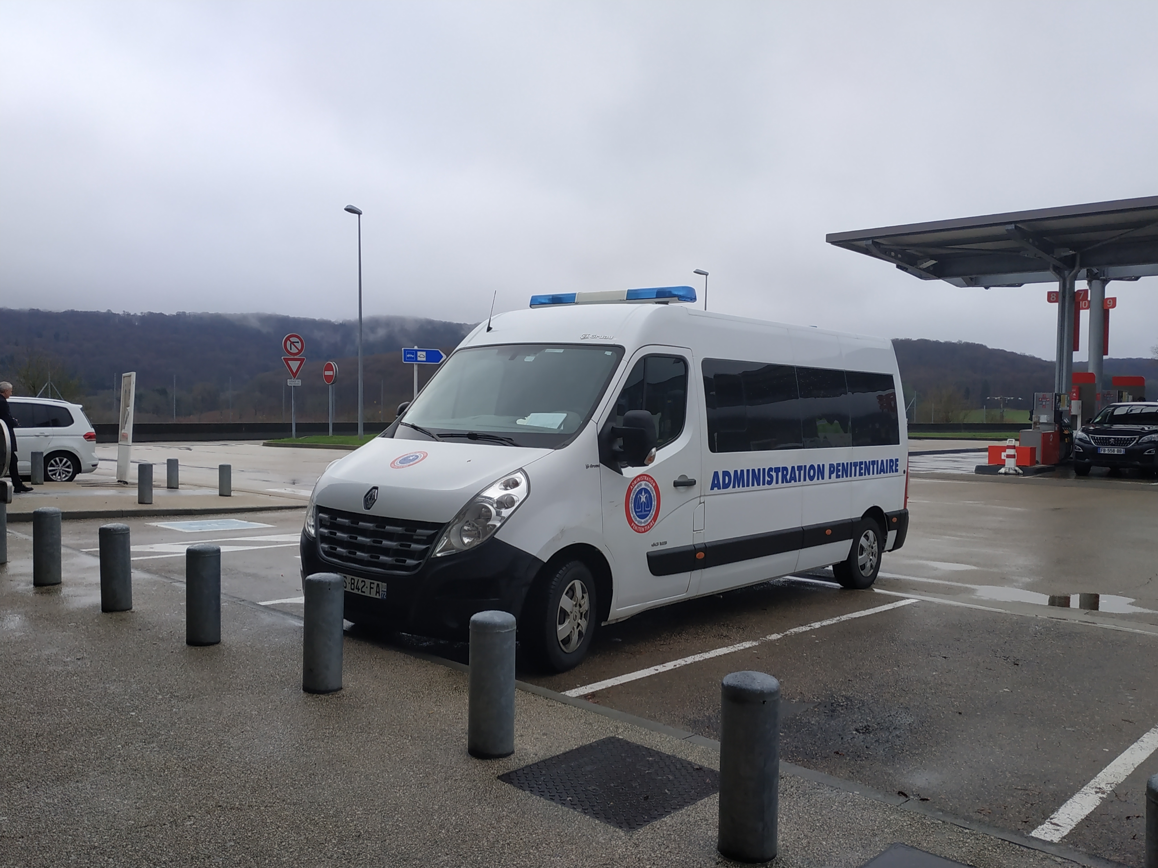 Renault Master III de l'administration pénitentiaire en 2018